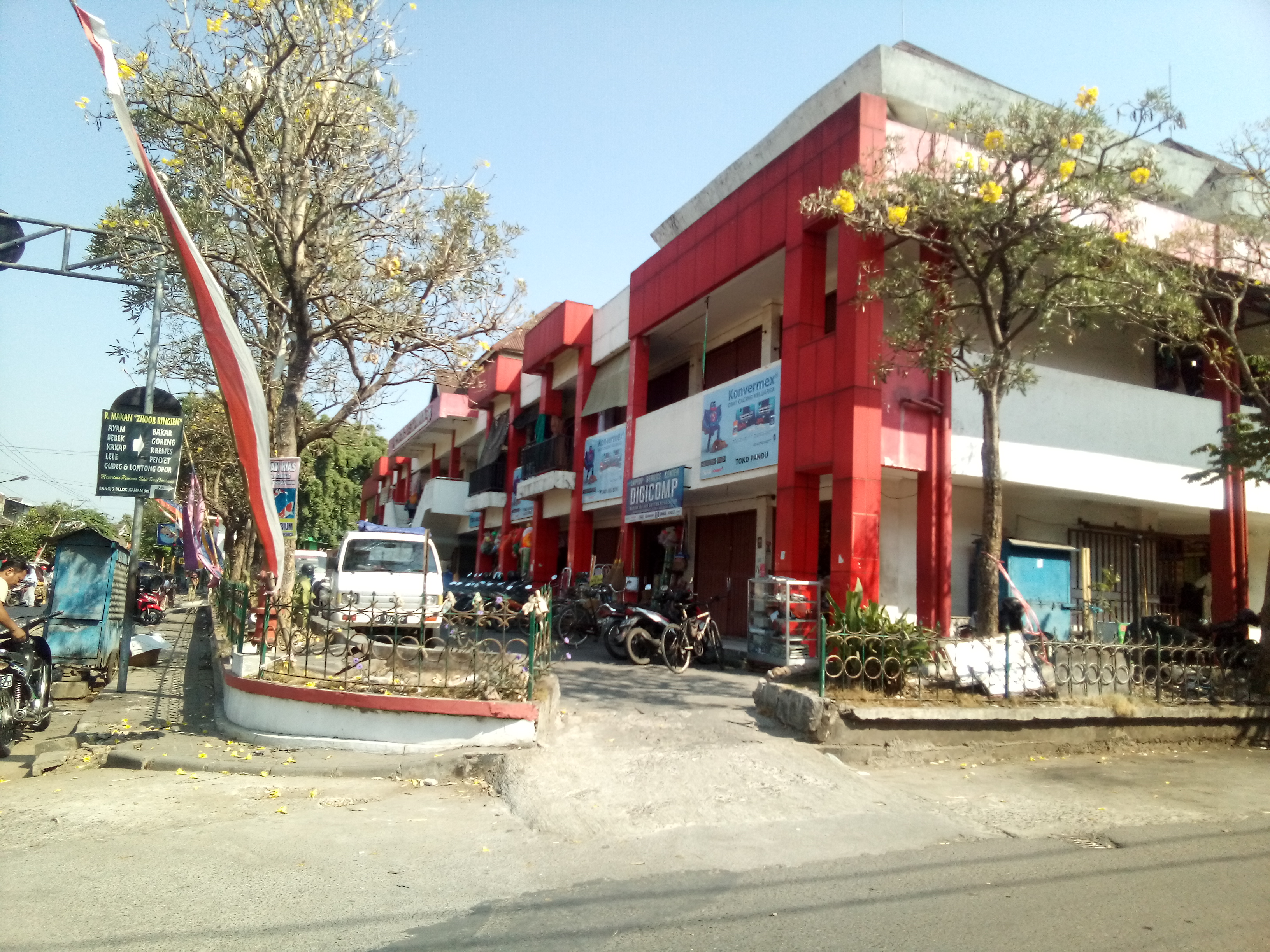 Jawa: Pasar